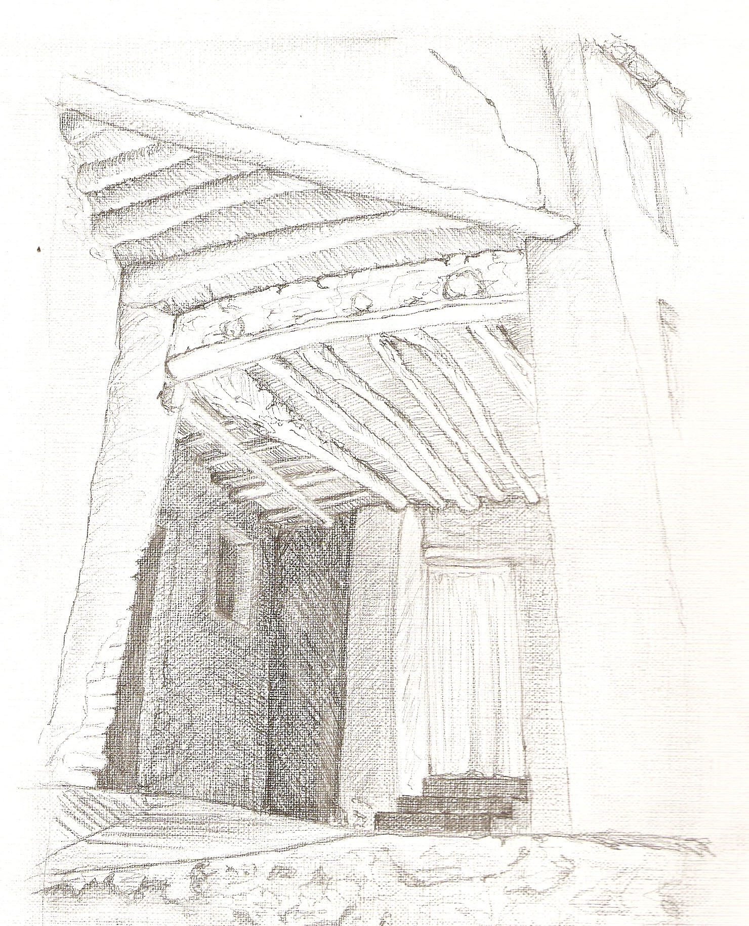 dibujo de un tinao de tipo "en vivienda"